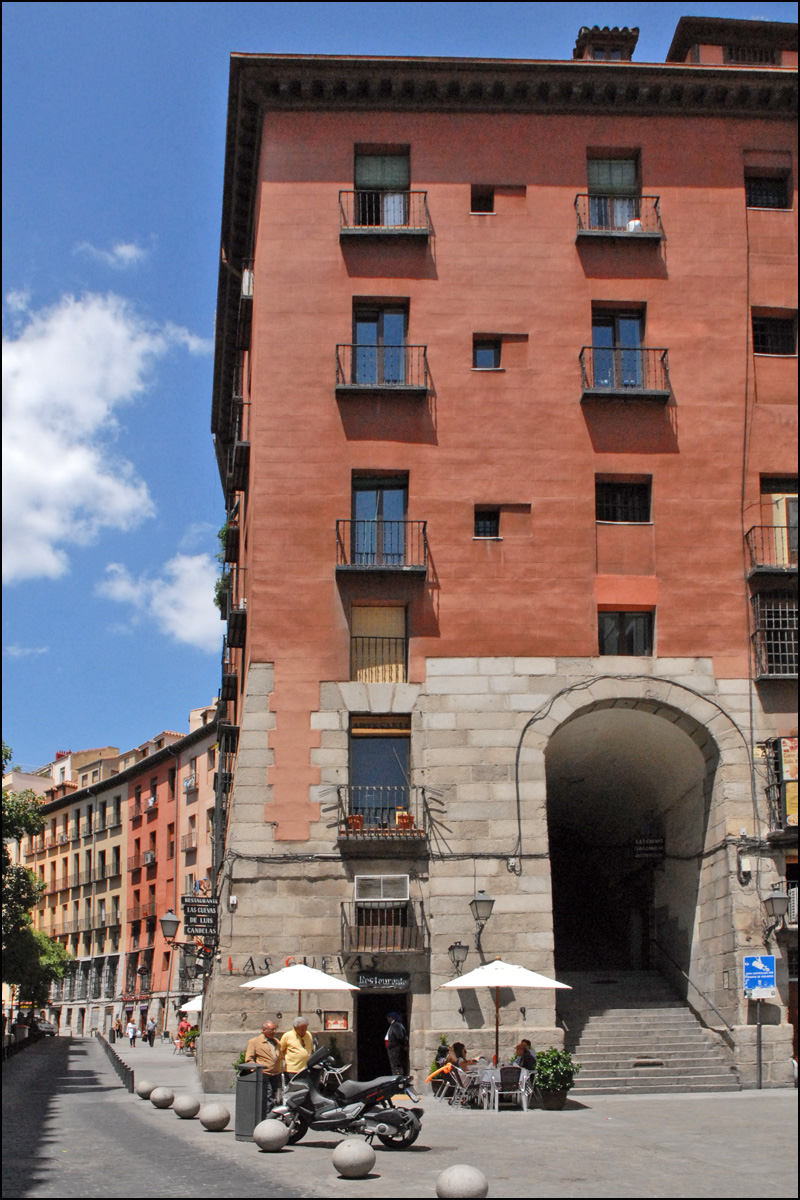 Dans le vieux Madrid, l'arc des couteliers mène de la rue Cuchilleros à la plaza Mayor.